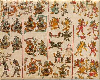 Primera lámina del Códice Vindobonensis. Cultura mixteca, posclásico tardío mesoamericano, Oaxaca (México).